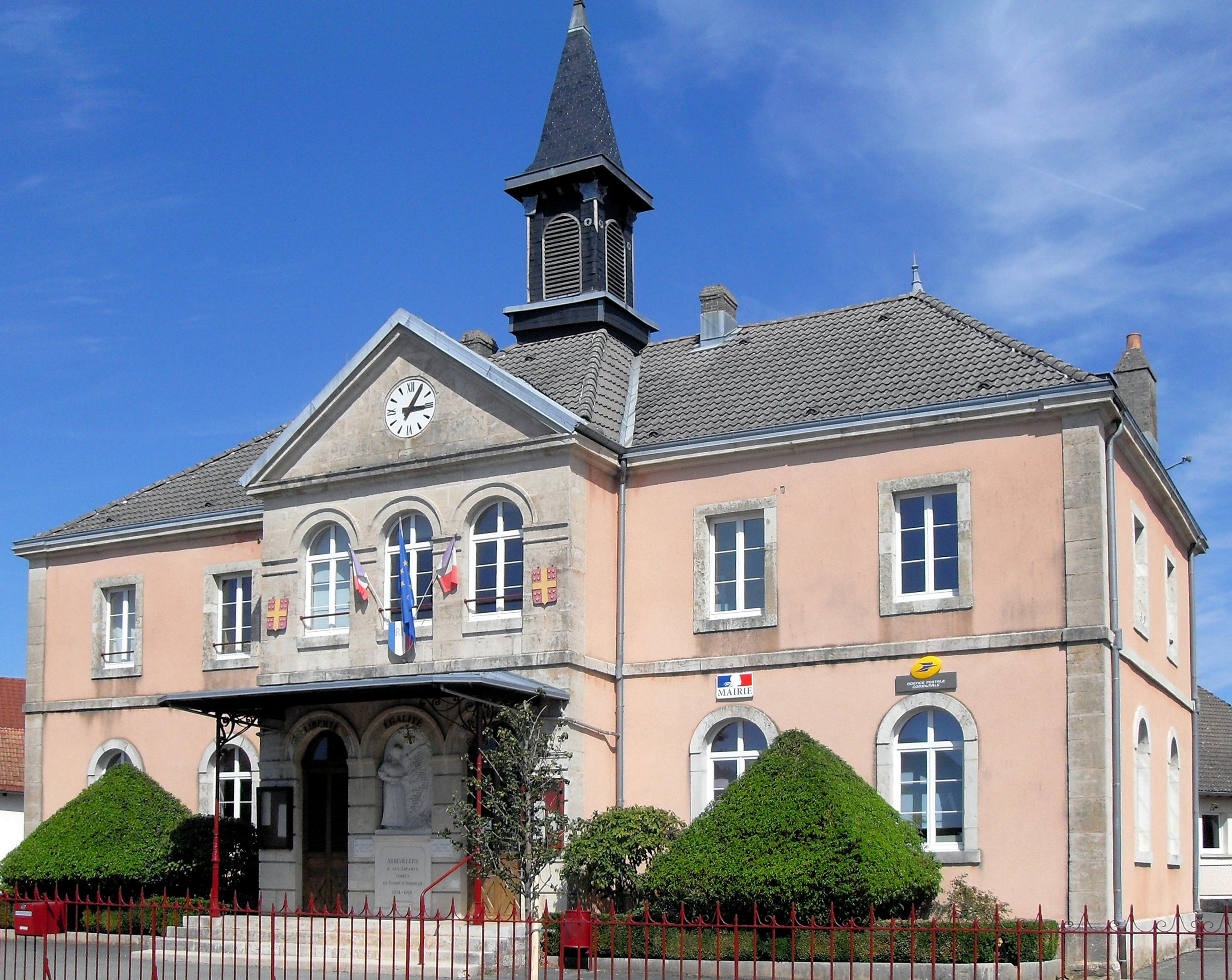 La mairie et la poste d'Abbévillers